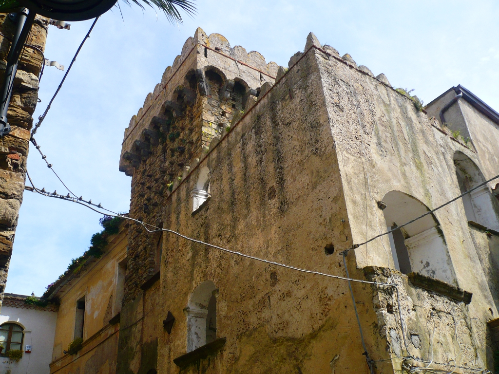 Il museo parrocchiale d'arte sacra di castellabate nel palazzo della torre merlata nel borgo medievale